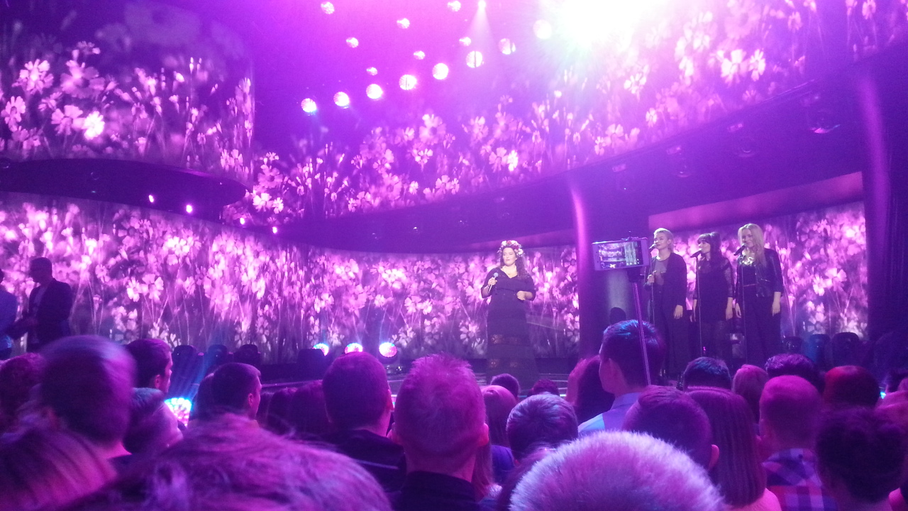 Polska piosenkarz Małgorzata Bernatowicz (Carmell) podczas występu w krajowych eliminacji do 62. Konkursu Piosenki Eurowizji.